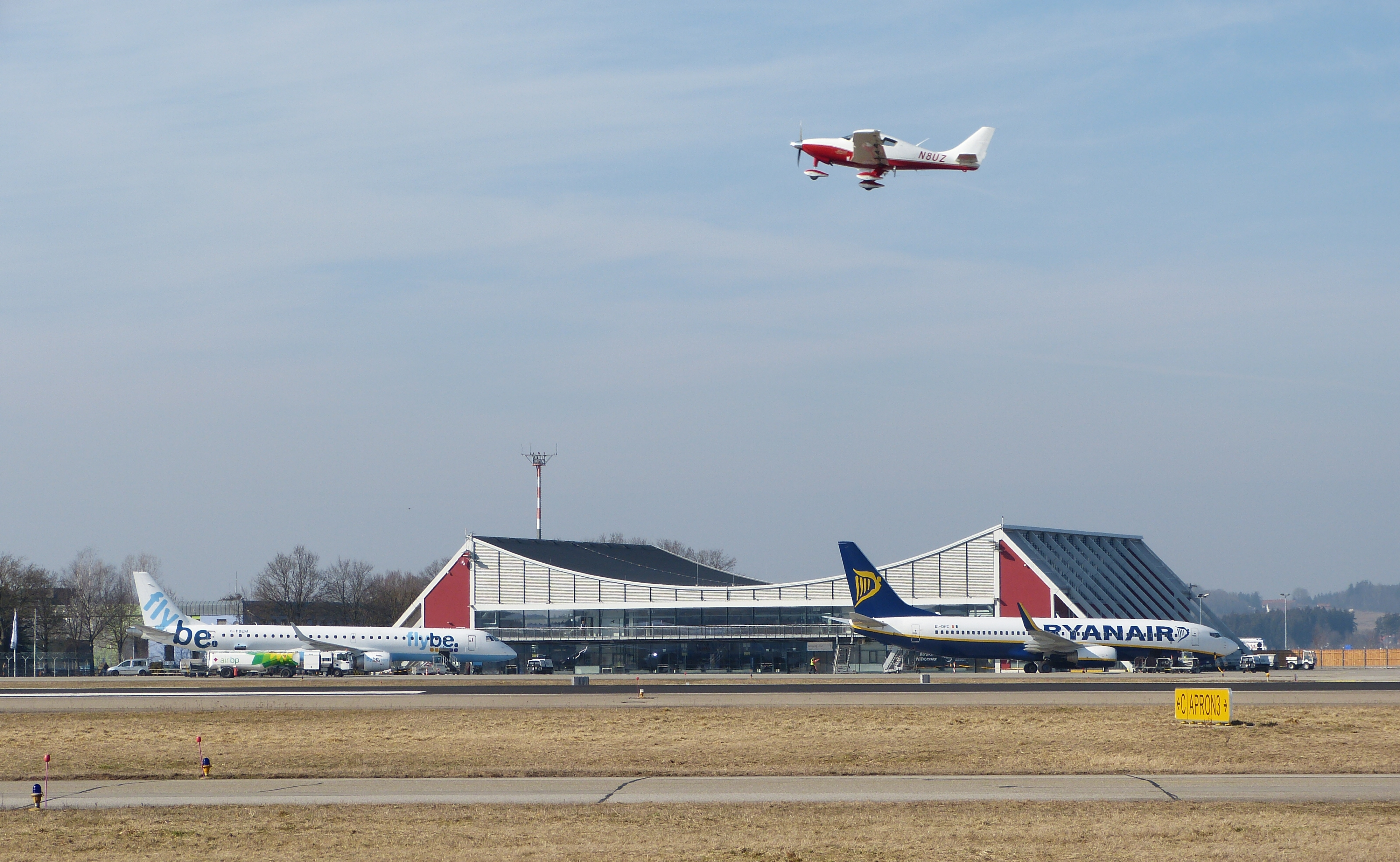 Der Flughafen Memmingen am 03.03.2012